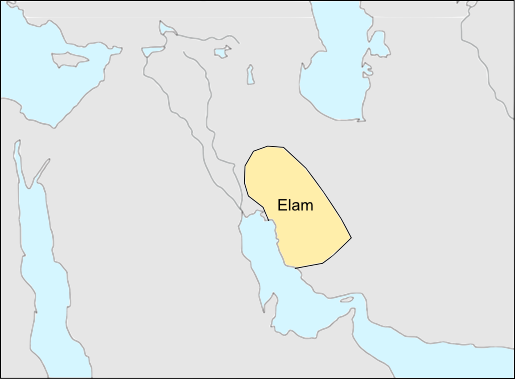 Localizacion d'Elam durant l'Antiquitat.